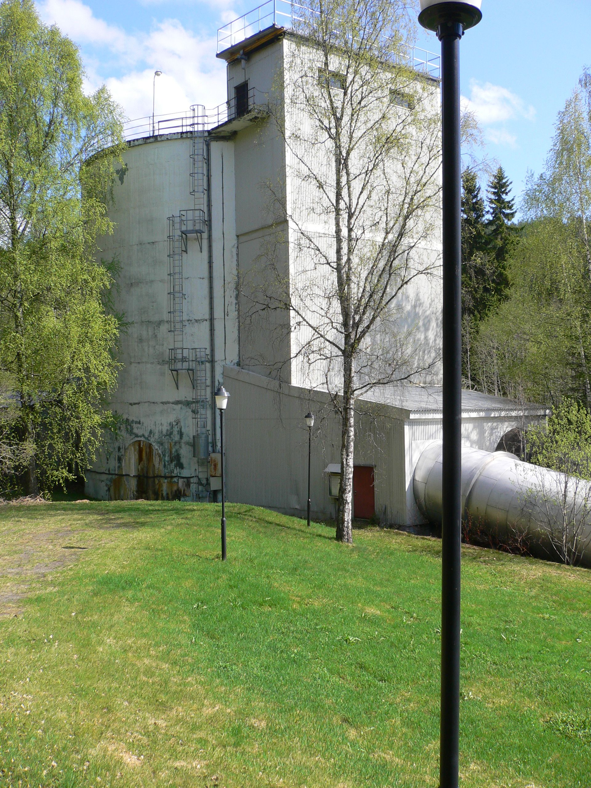 Hensfoss kraftverk, svingekammer og lukehus